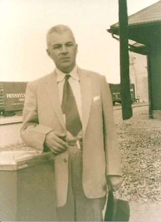 Felix Fernandez en la estacion de trenes de Pensylvania